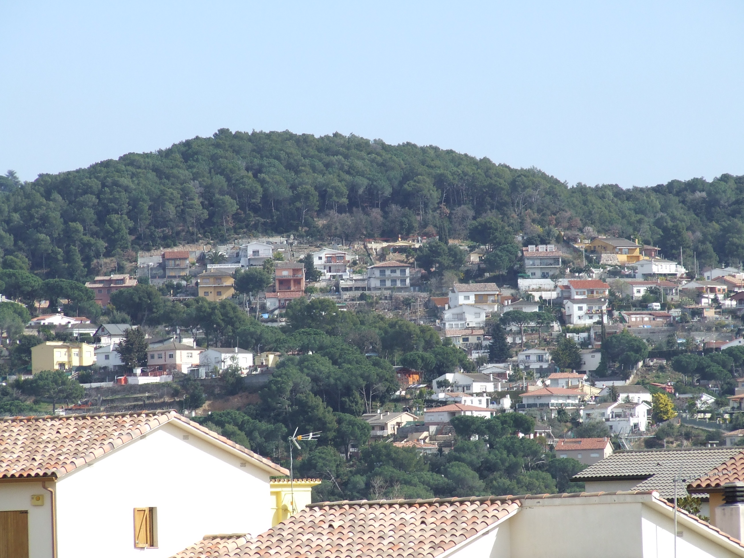 La urbanització el Diamant del Vallès (Bigues, Bigues i Riells, Vallès Oriental)